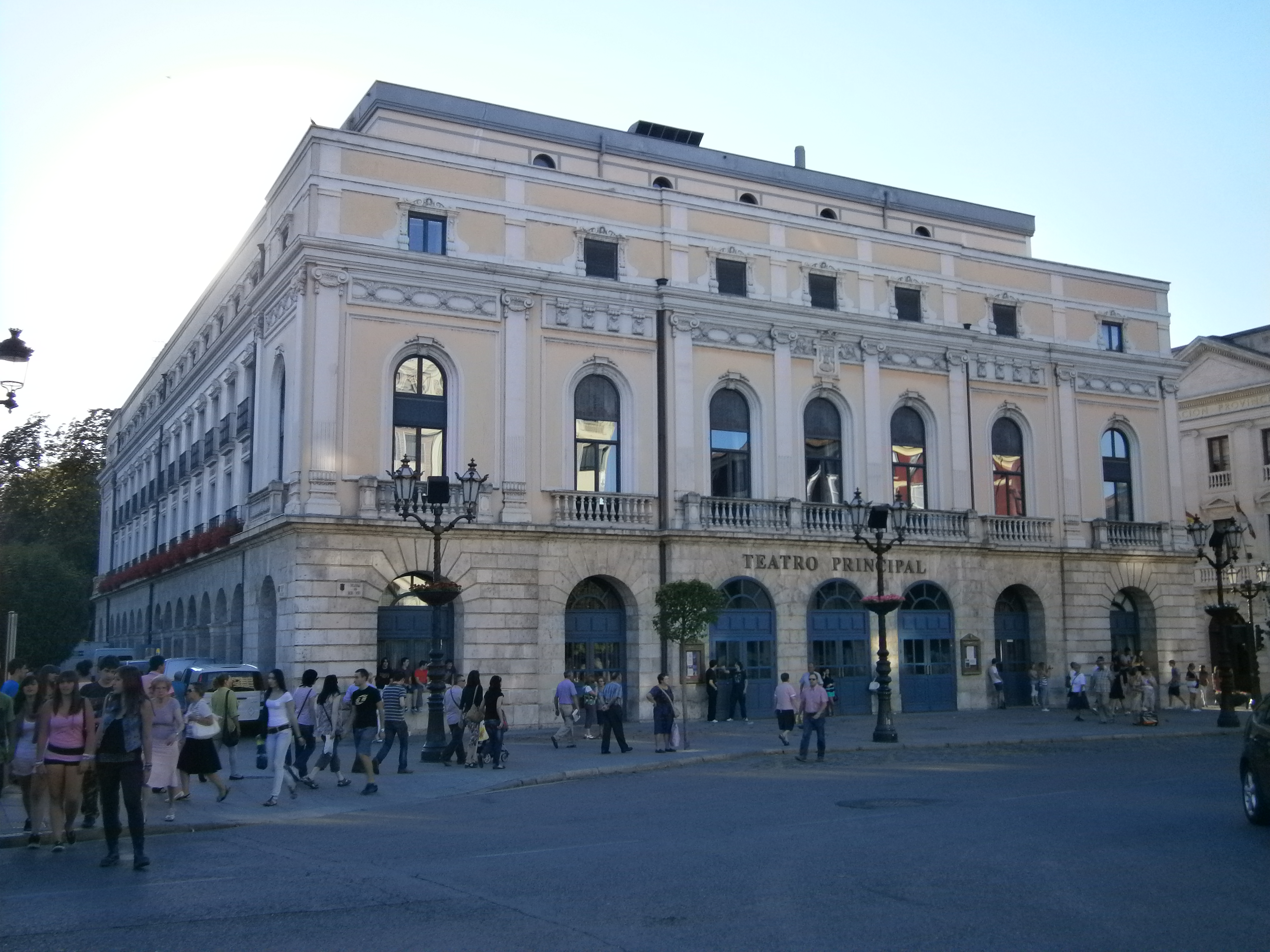 Teatro Principal de Burgos, desde la plaza del Cid